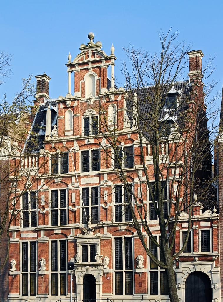 16 huis met de hoofden nr.2249